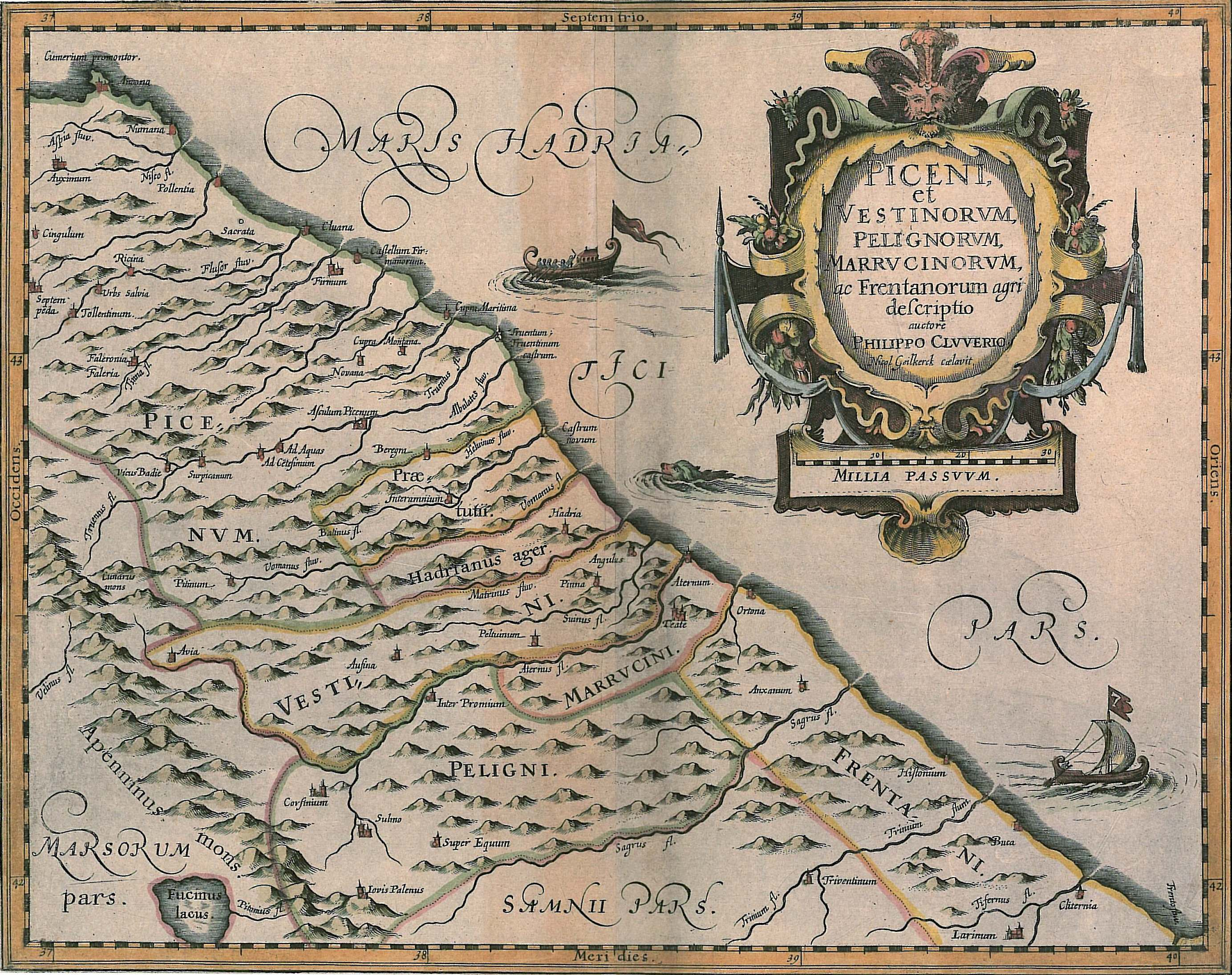 Piceni et Vestinorum, Pelignorum, Marrucinorum; ac Frentanorum agri descriptio, 1624 - Philip Clüver edita in Italia antiqua, Lugduni Batavorum, Elsevier, 1624 (mm 282x363, Collezione privata)